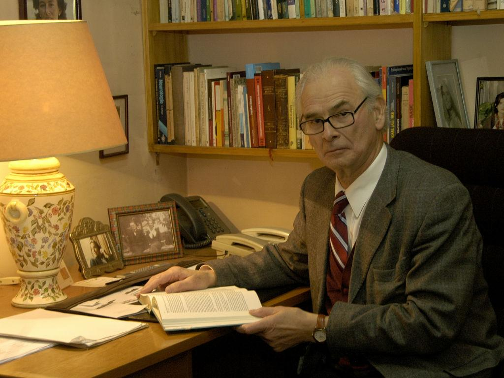 Foto del doctor Otto Dörr Zegers en la Facultad de Medicina de la Universidad de Chile.